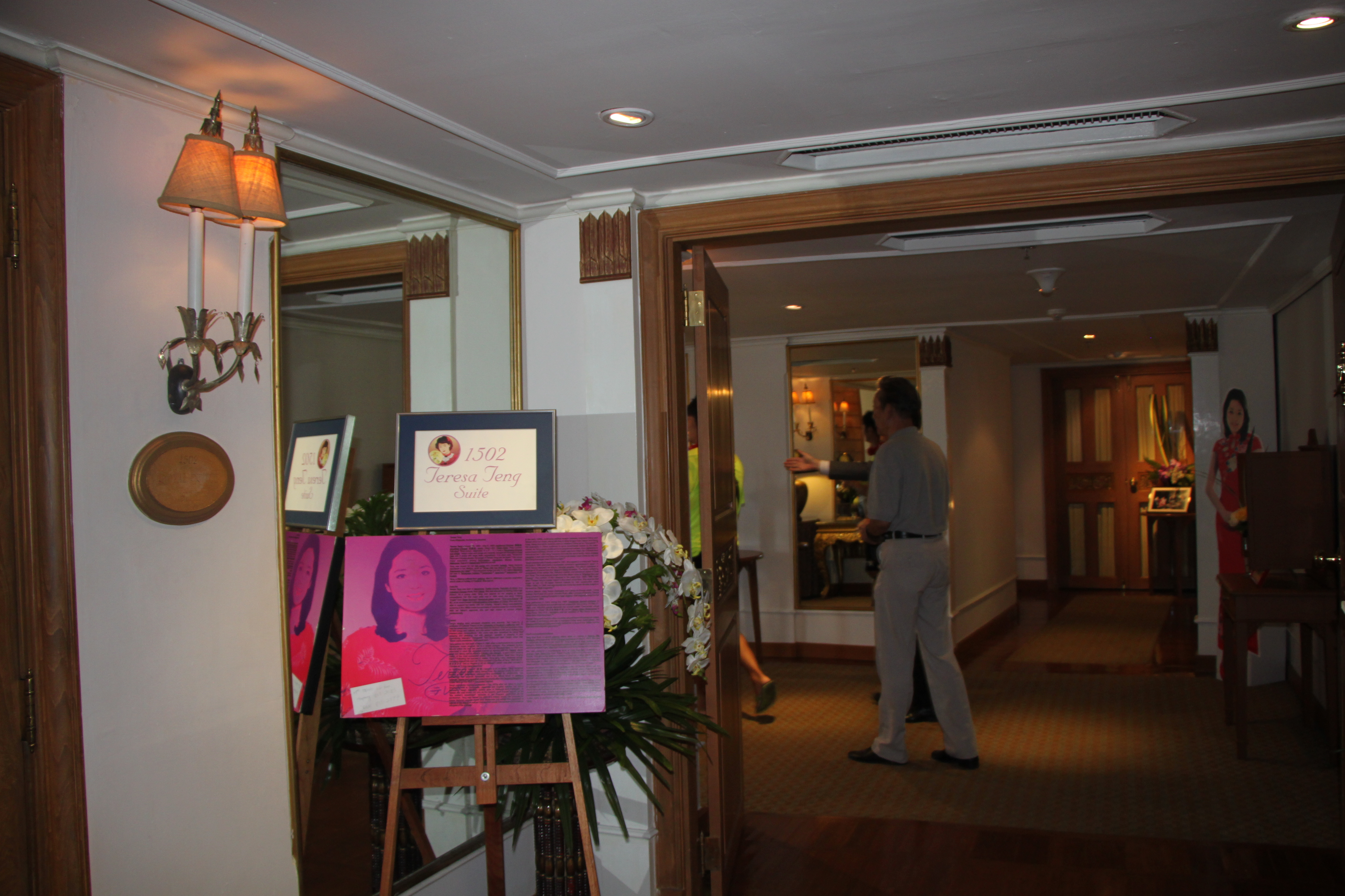 邓丽君故居。（清迈帝国美平酒店1502房间）